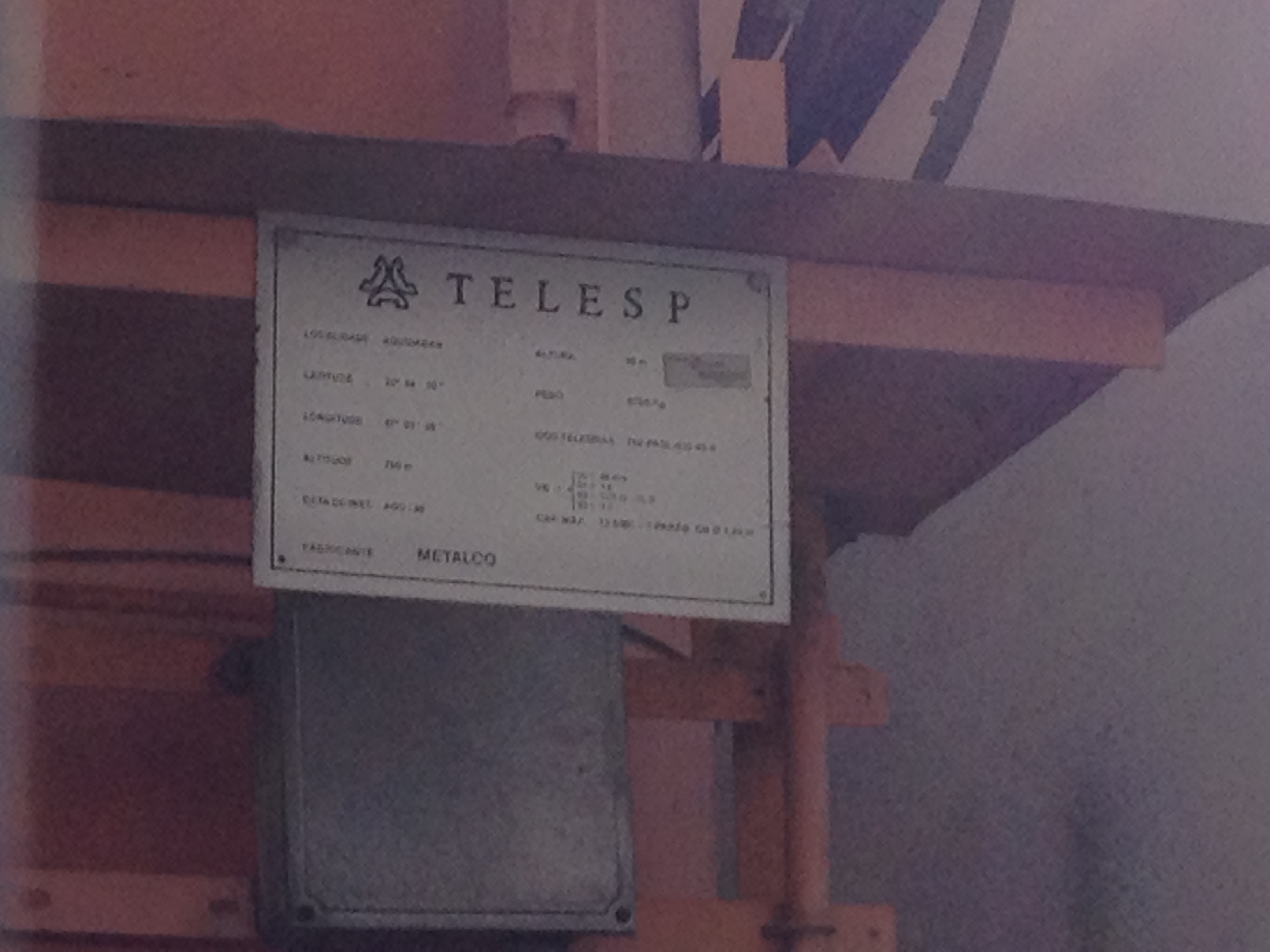 Placa de informação na base uma antena de telefonia celular da antiga TELESP, hoje VIVO.